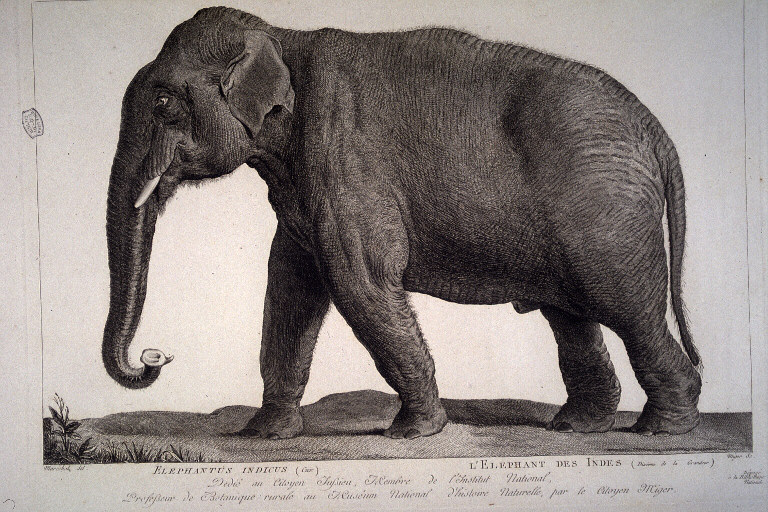 Représentation de l'éléphant Hans, animal confisqué en 1795 par les Armées de la République française au Stathouder Guillaume V